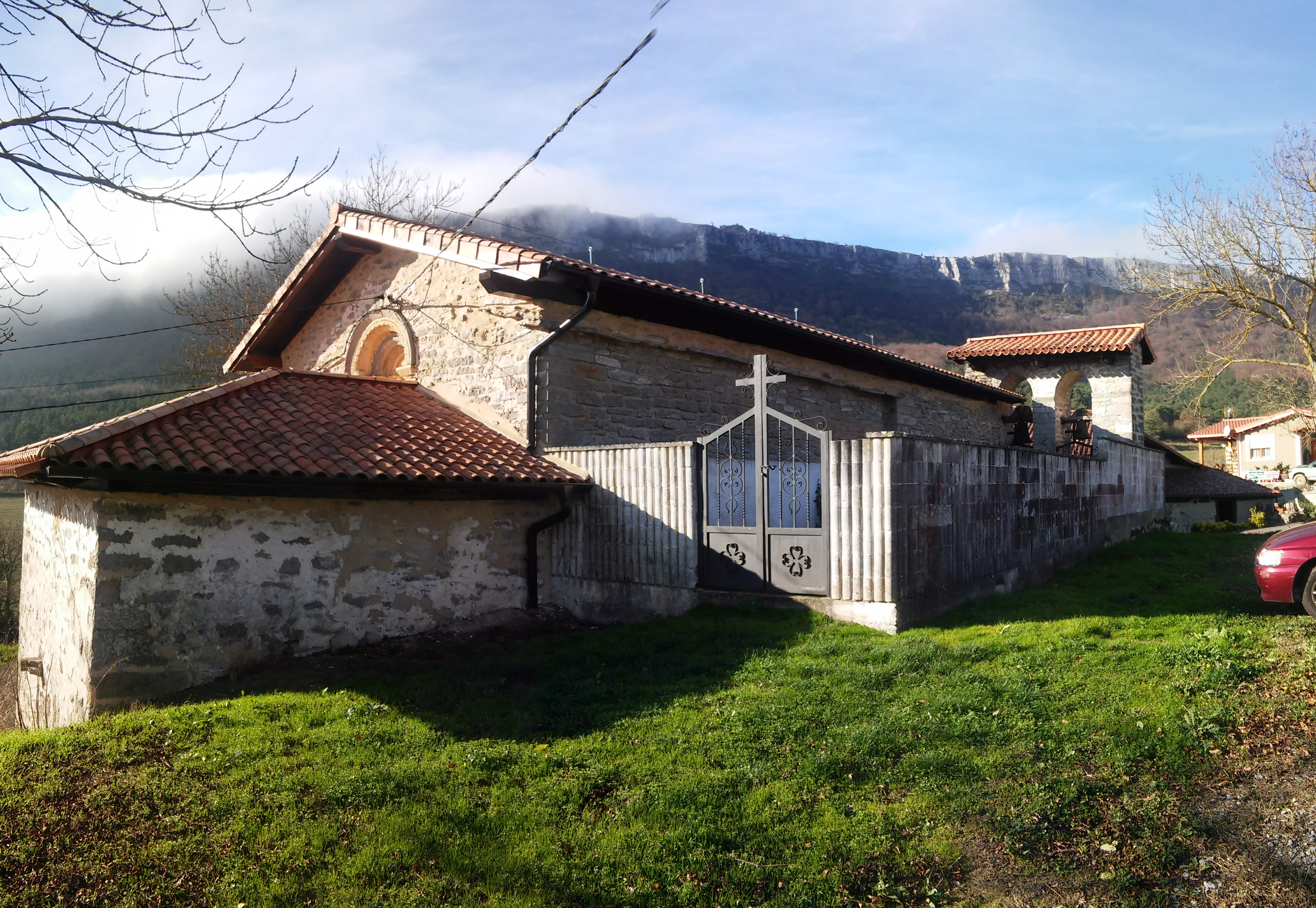 Arriano herria (Kuartango), eliza